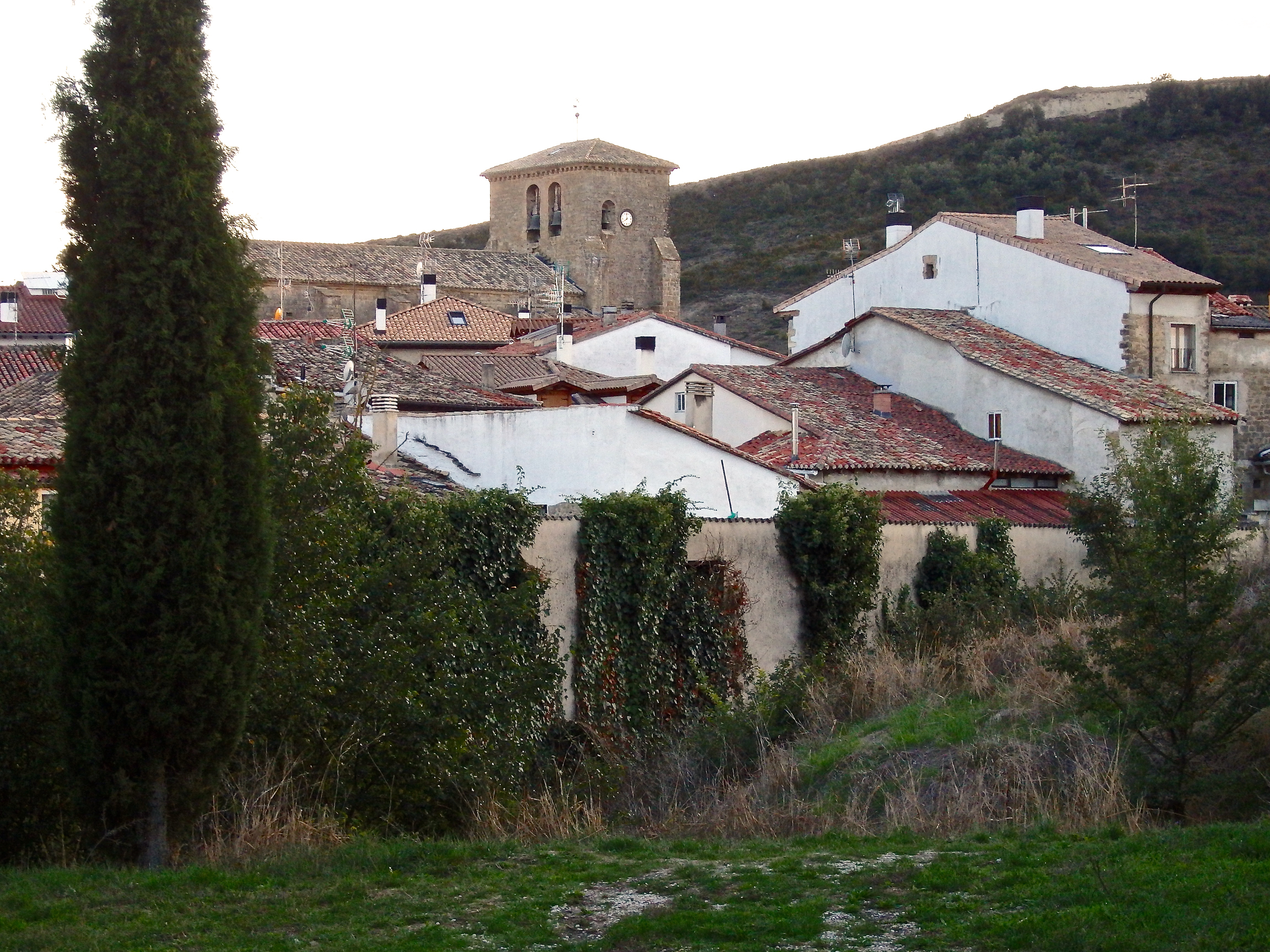 Urroz Villa